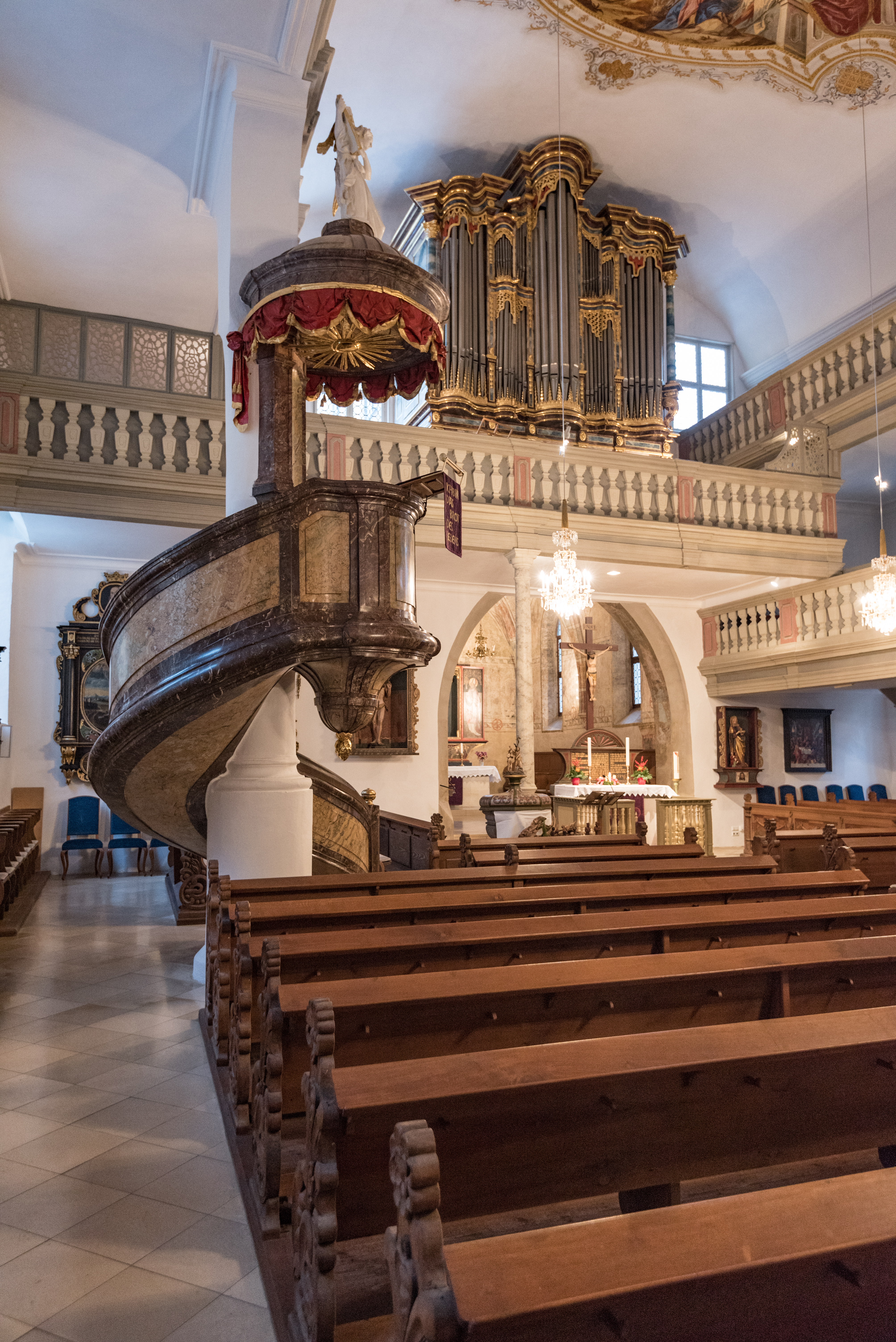 Dinkelsbühl, Dr.-Martin-Luther-Straße 10, Spitalkirche